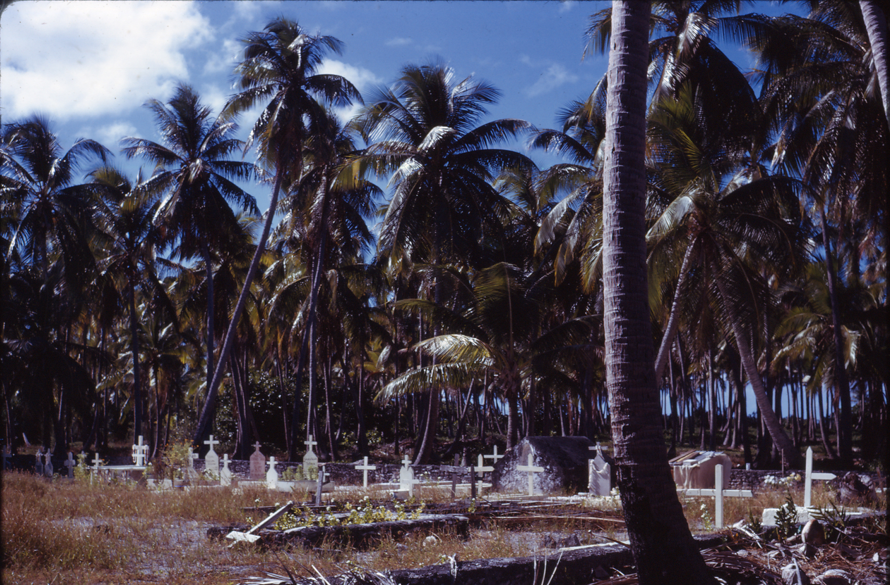 Vue du cimetière de Hao, un atoll situé au centre-est de l'archipel des Tuamotu en Polynésie française